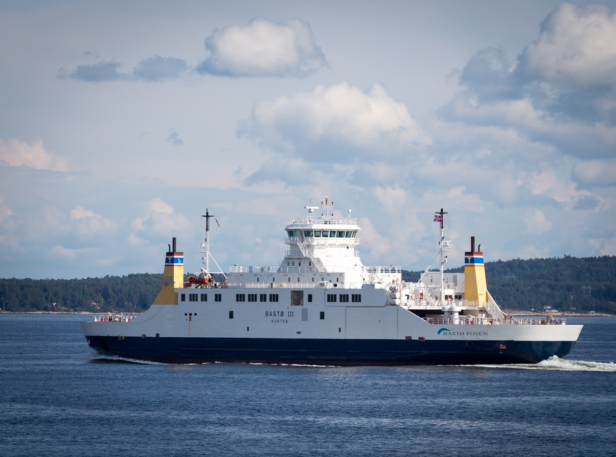 Bastø III på vei fra Horten til Moss, sommeren 2015.